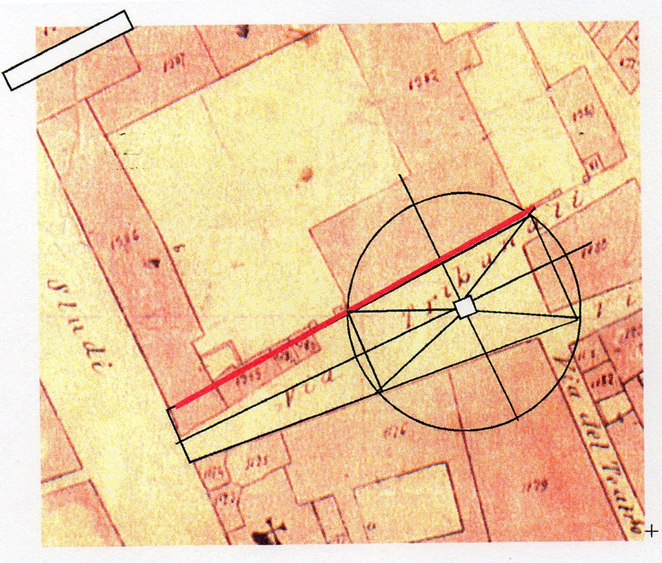 Planimetria del monumento a M. Tumminelli